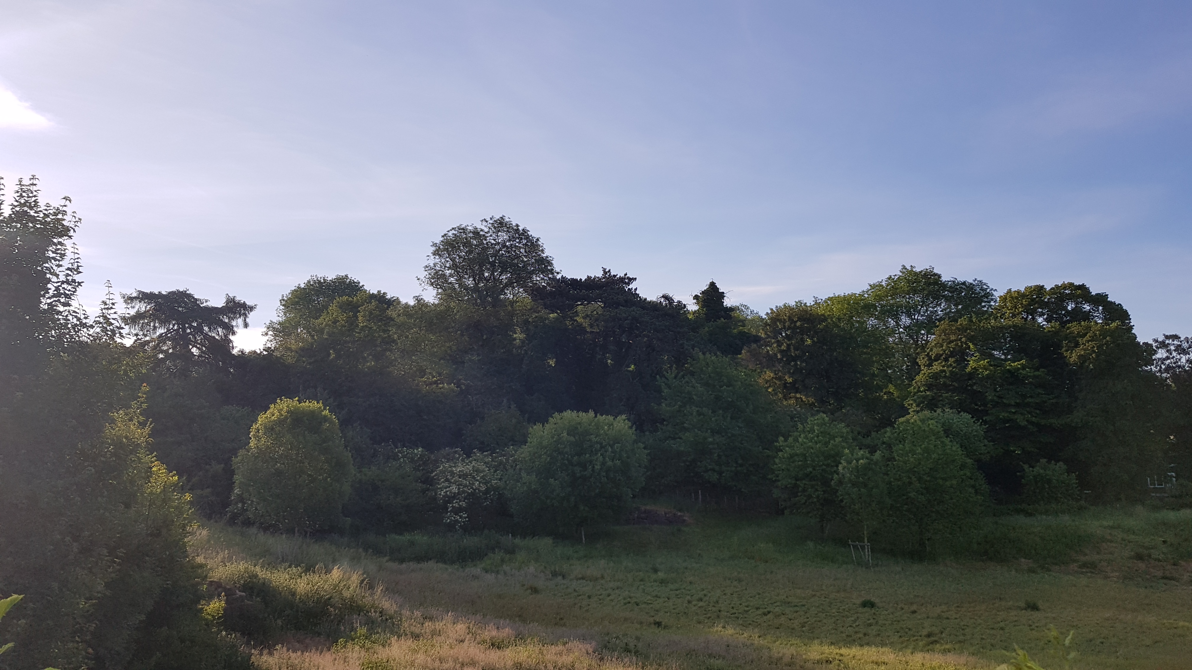 Nevenschaelsberggroeve, Valkenburg, Nederland